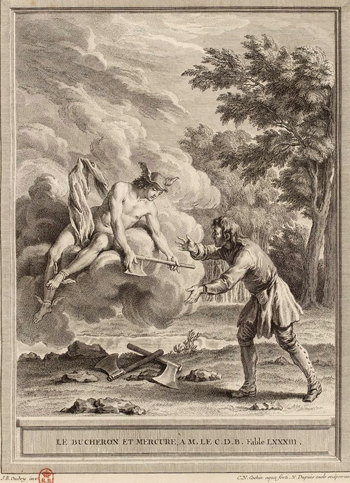 Gravure réalisée par Nicolas-Gabriel Dupuis et Charles-Nicolas Cochin (II) d'après un dessin de Jean-Baptiste Oudry représentant la fable Le Bûcheron et Mercure de Jean de La Fontaine (fable 1 du livre V). Cette gravure est parue dans l'édition complète des fables de La Fontaine, parue en quatre tomes chez l'éditeur Desaint & Saillant, rue saint Jean de Beauvais à Paris, 1755-1759.